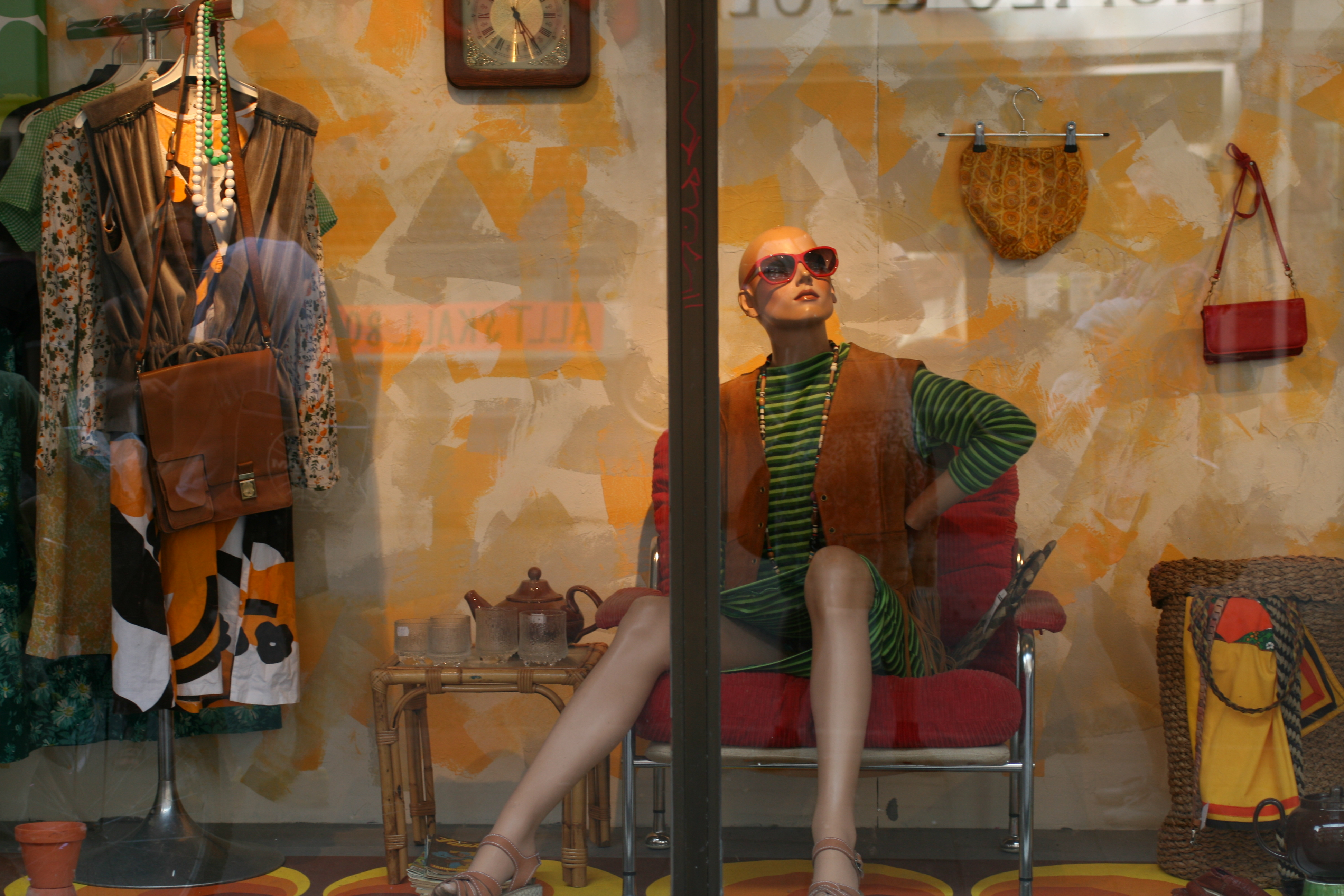 Skyltfönster till Myrorna i Malmö.